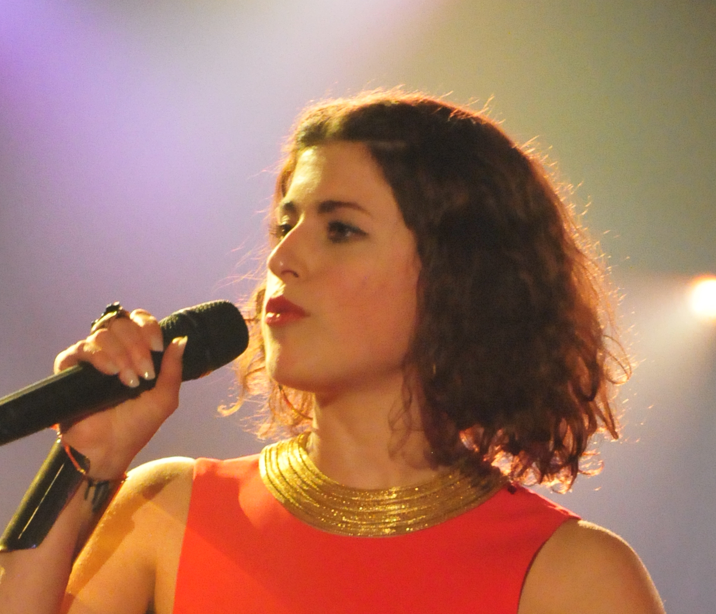 ESC Clubkonzert 2015: Große Freiheit 36 in Hamburg - Ann Sophie